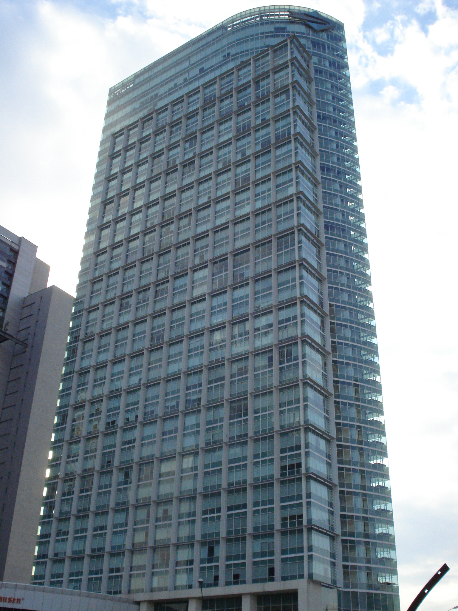 Condominio Santa Fe 443 o también conocido como la Torre Santa Fe Pads, es el segundo edificio más alto del centro financiero Santa Fe ubicado en la Ciudad de México.